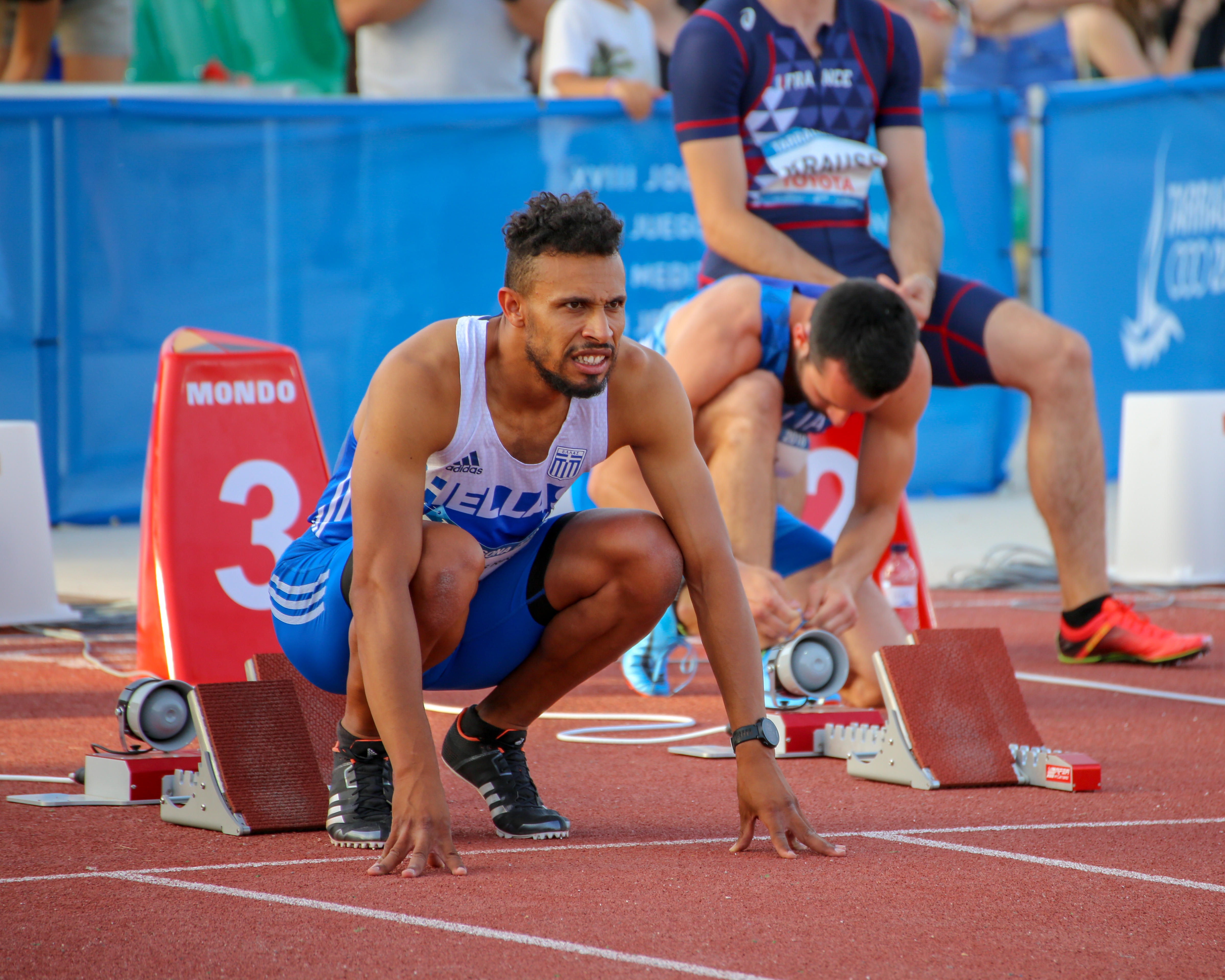 Konstadinos Douvalidis en los 110 metros vallas de los Juegos del Mediterráneo 2018